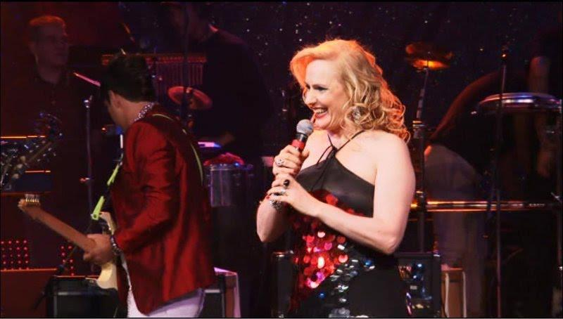 Elizabeth Moisés em 2009 lançamento do álbum chuva de sangue.